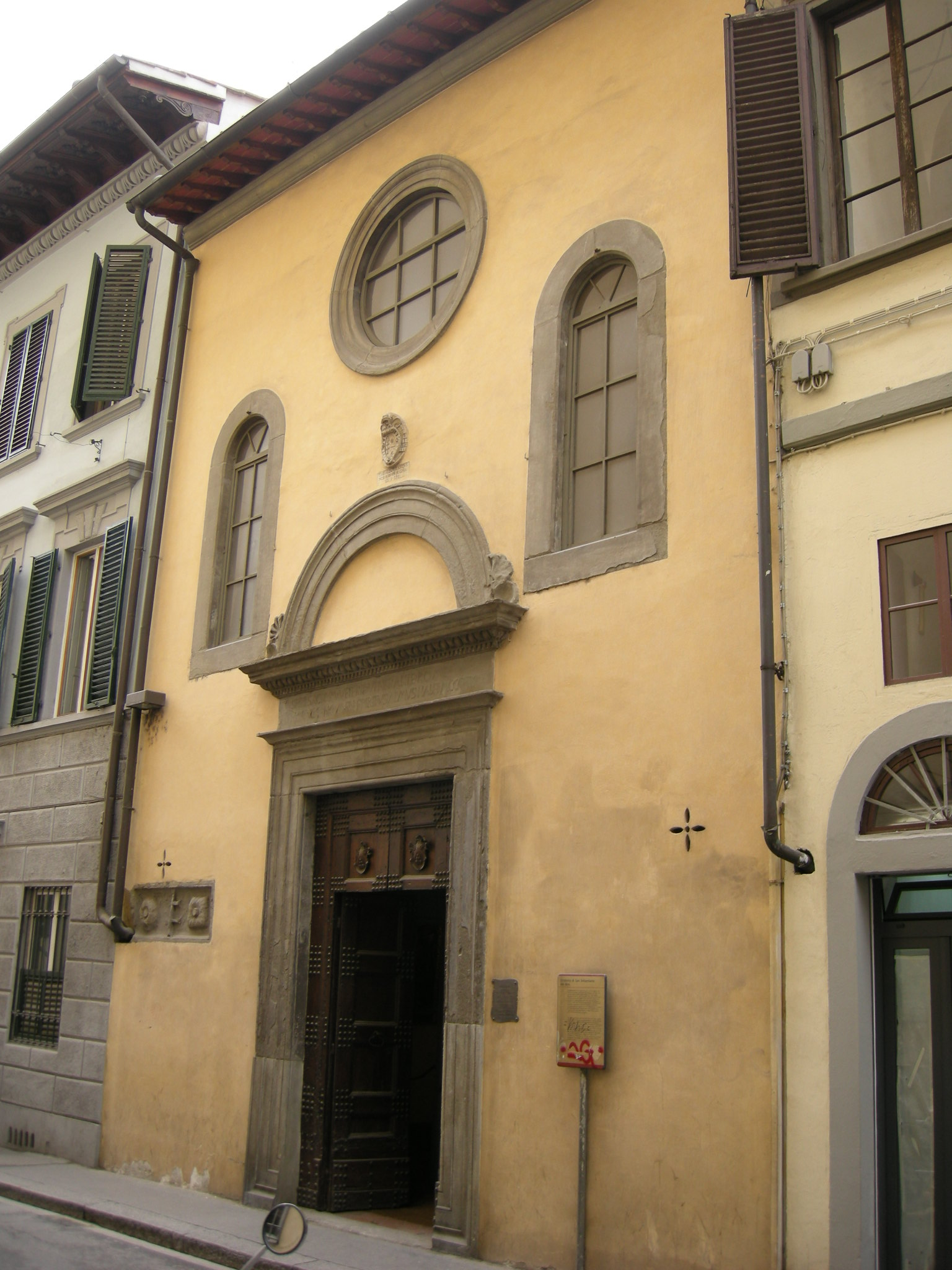 Oratorio dei bini, esterno